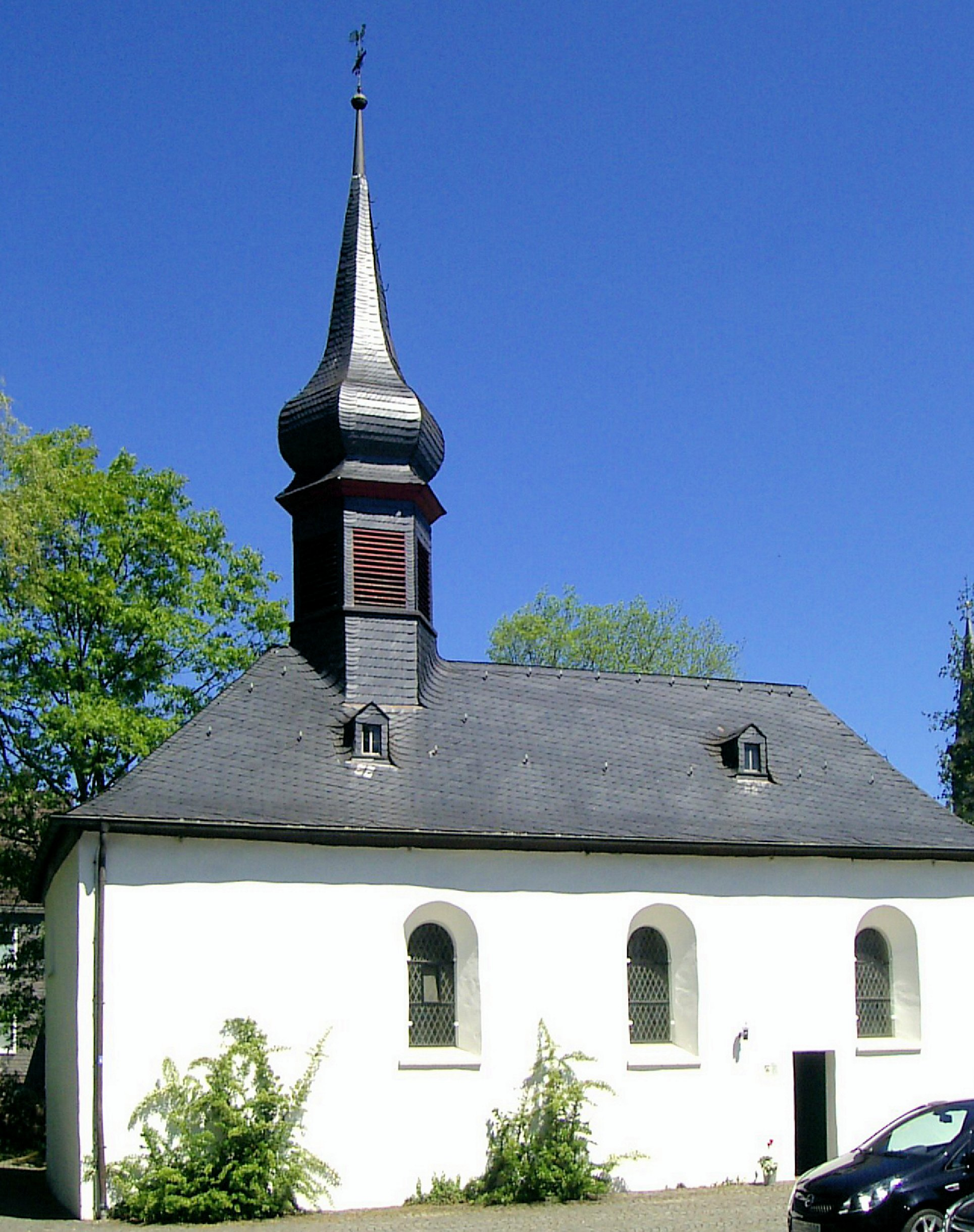 evangelische St. Antonius-Kapelle in Denklingen, Oberbergischer Kreis, Nordrhein-Westfalen, Deutschland